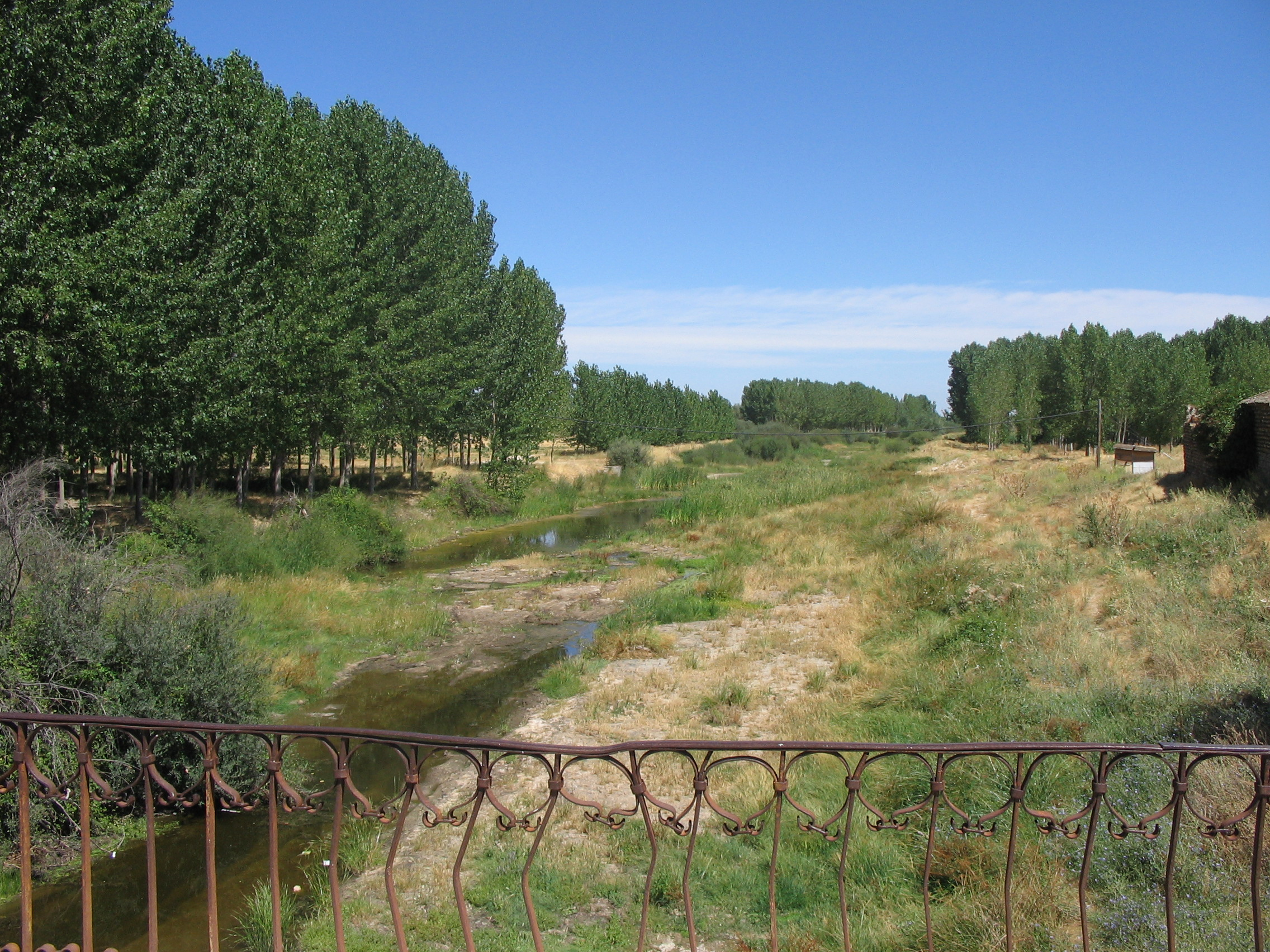 El rio Voltoya a su paso por Juarros de Voltoya